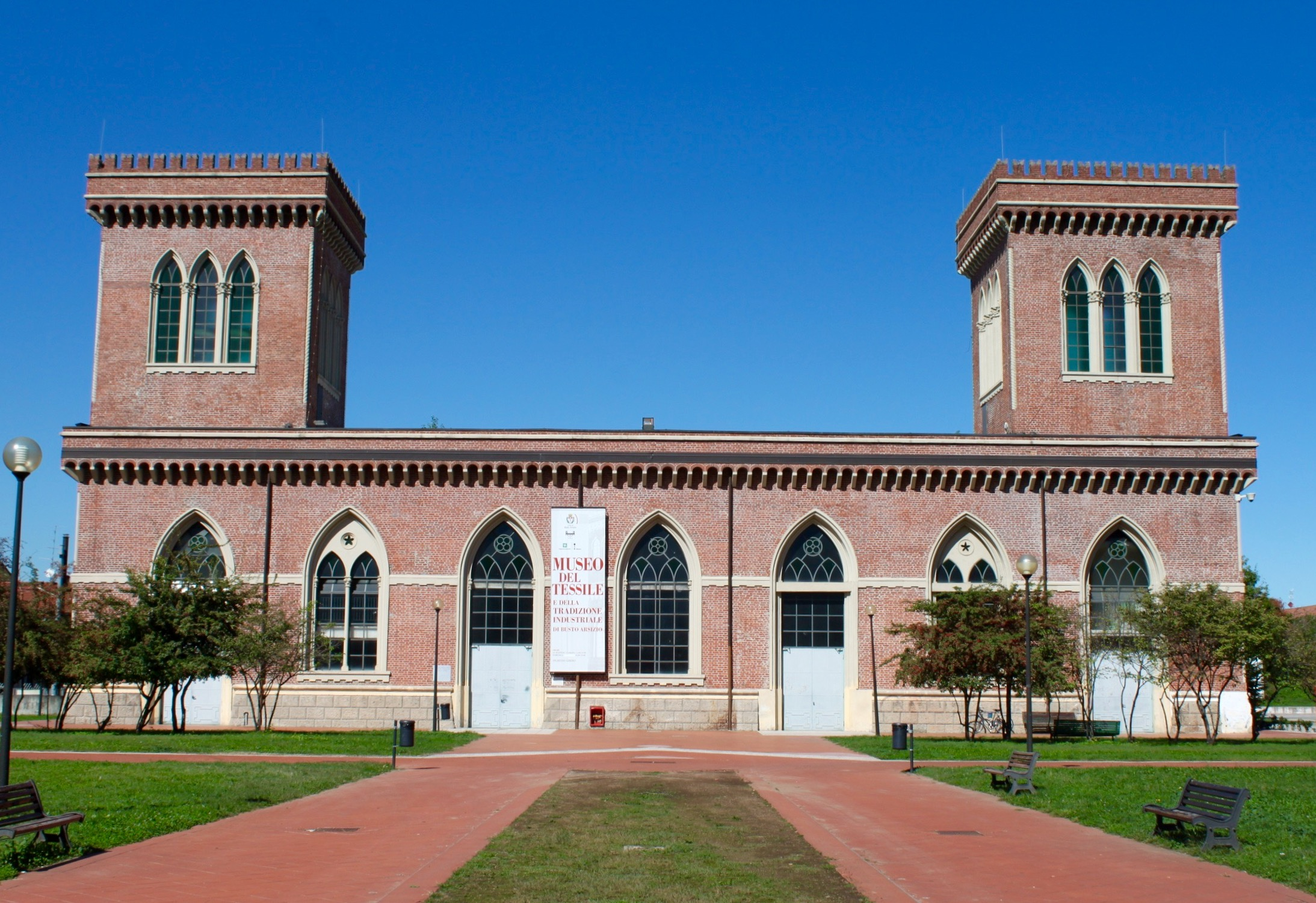 Museo del tessile e della tradizione industriale This is a photo of a monument which is part of cultural heritage of Italy.